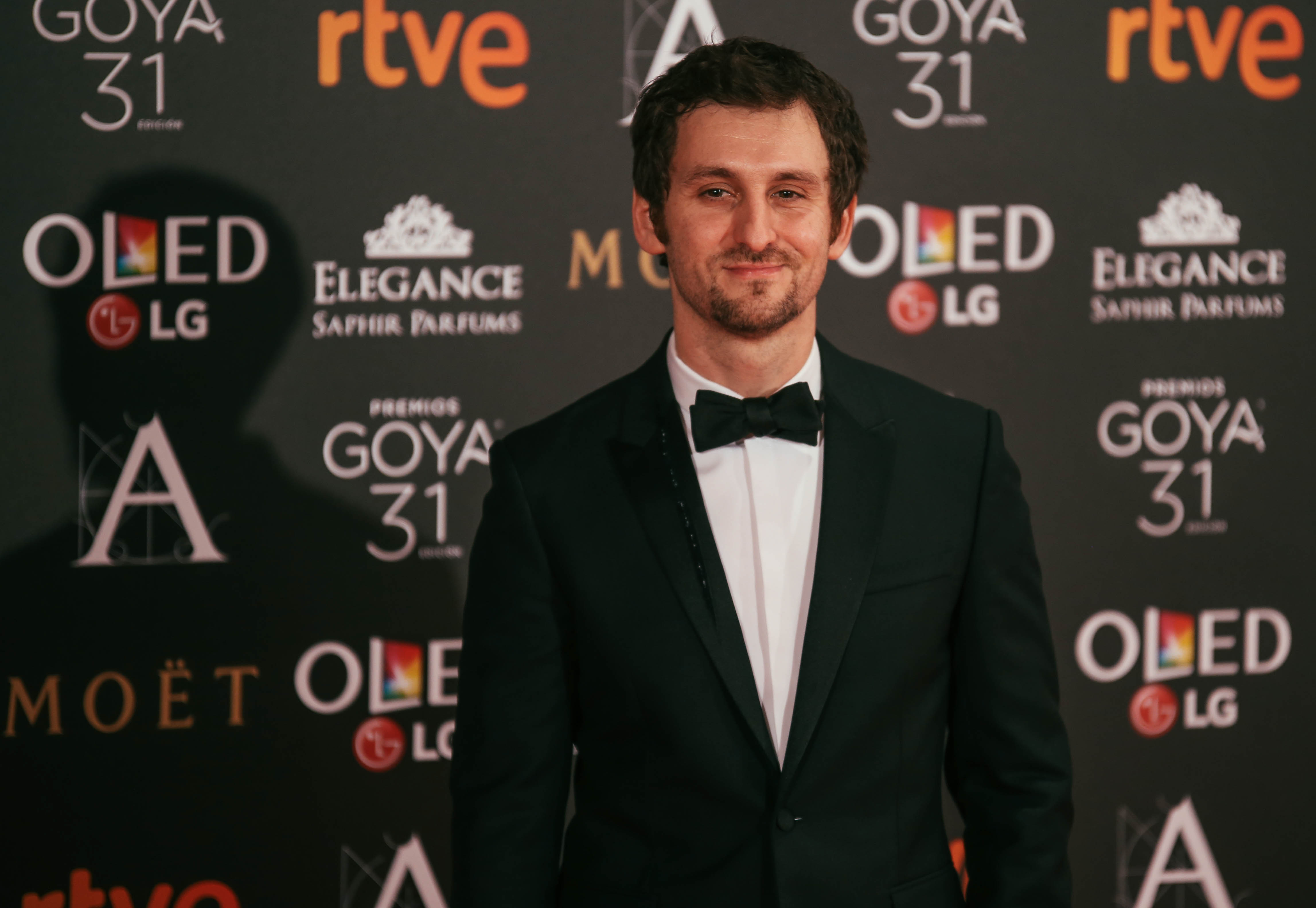 Raúl Arévalo en la alfombra roja de los Premios Goya 2017